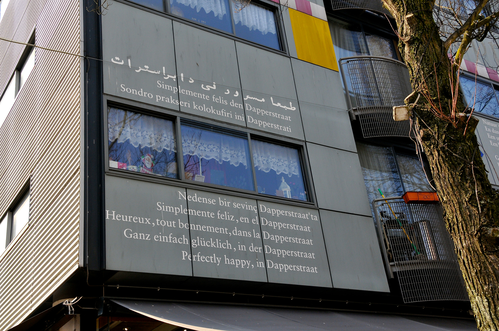 De Dapperstraat Natuur is voor tevredenen of legen. En dan: wat is natuur nog in dit land? Een stukje bos, ter grootte van een krant. Een heuvel met wat villaatjes ertegen. Geef mij de grauwe, stedelijke wegen, De in kaden vastgeklonken waterkant, De wolken, nooit zo schoon dan als ze, omrand Door zolderramen, langs de lucht bewegen. Alles is veel voor wie niet veel verwacht. Het leven houdt zijn wonderen verborgen Tot het ze, opeens, toont in hun hoge staat. Dit heb ik bij mijzelve overdacht, Verregend, op een miezerige morgen, Domweg gelukkig, in de Dapperstraat. J.C. Bloem (1947)